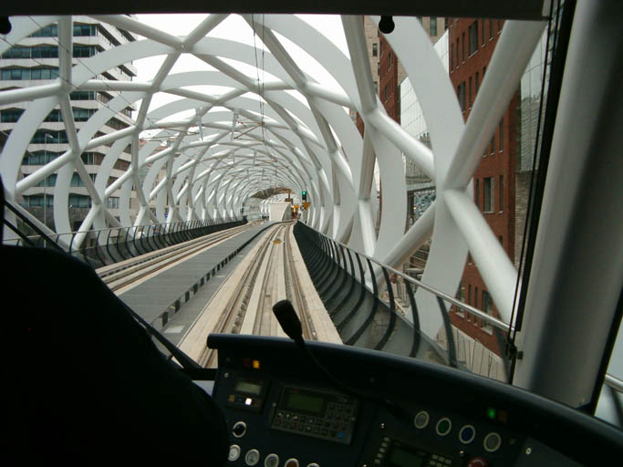 Randstadrail nadert de Netkous